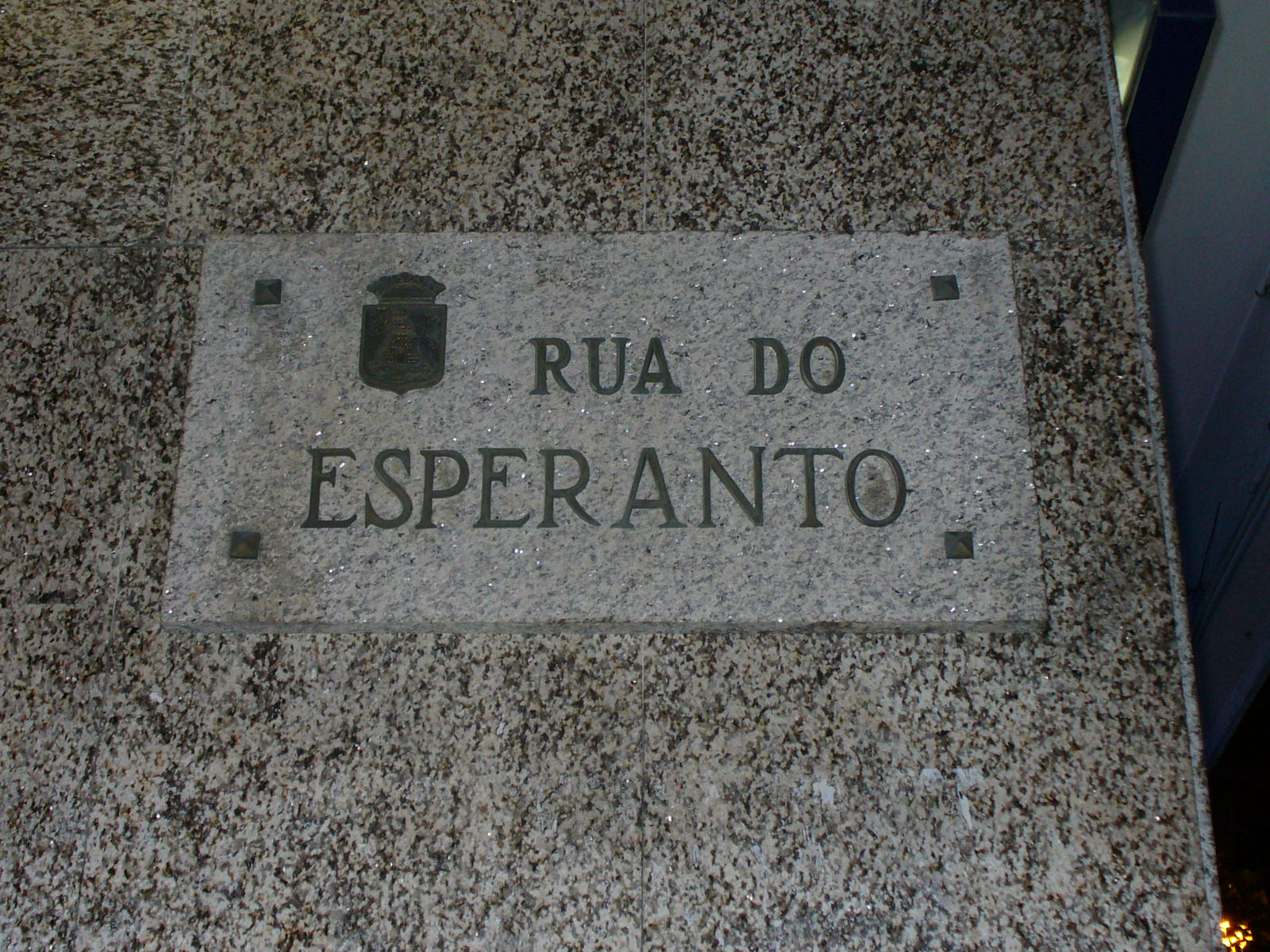 Esperantostrato en Vigo, Galegio (nomplato)